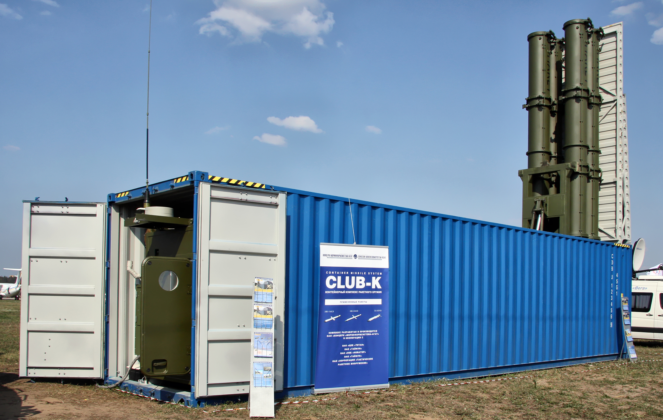 Контейнерный комплекс ракетного оружия Club-K в МАКС-2011Tiếng Việt: Hệ thống tên lửa Club-K tại MAKS-2011